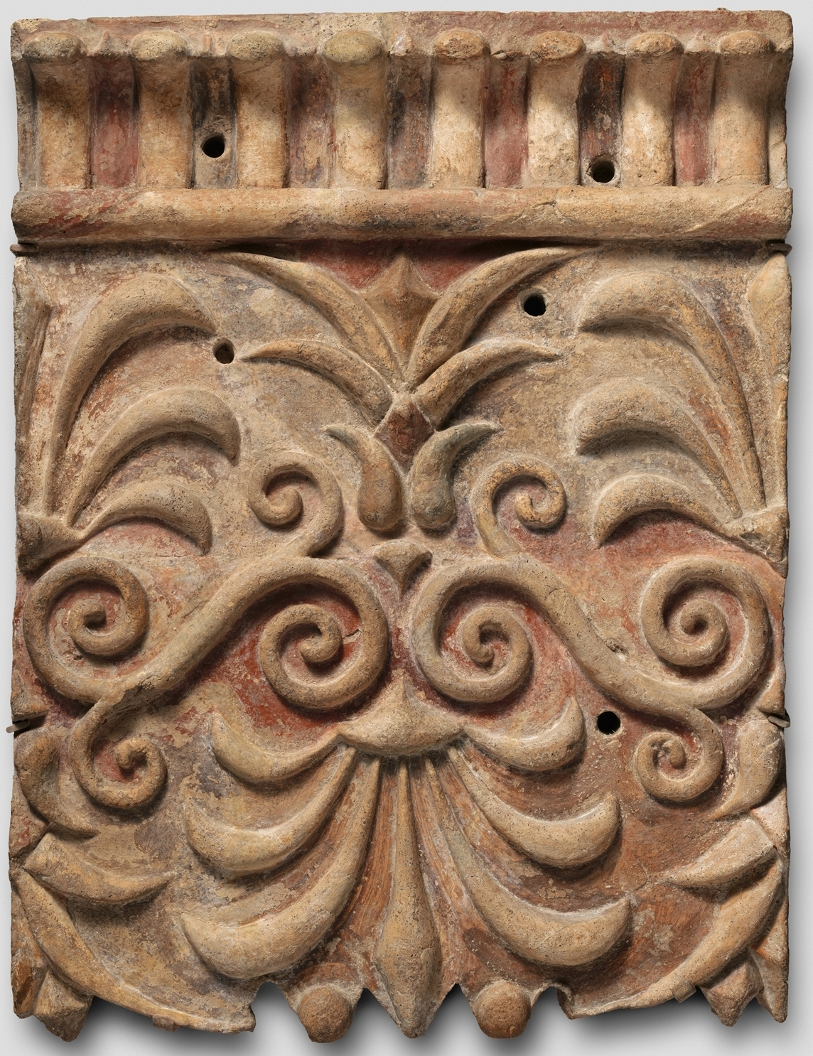 Etruscan; Revetment, architectural; Terracottas